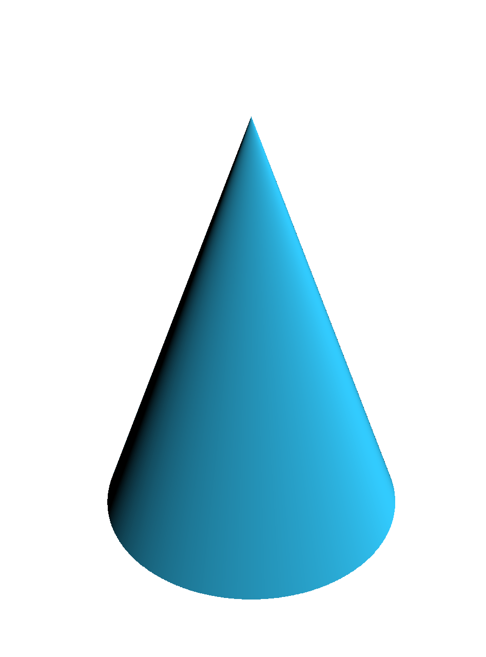 Cone